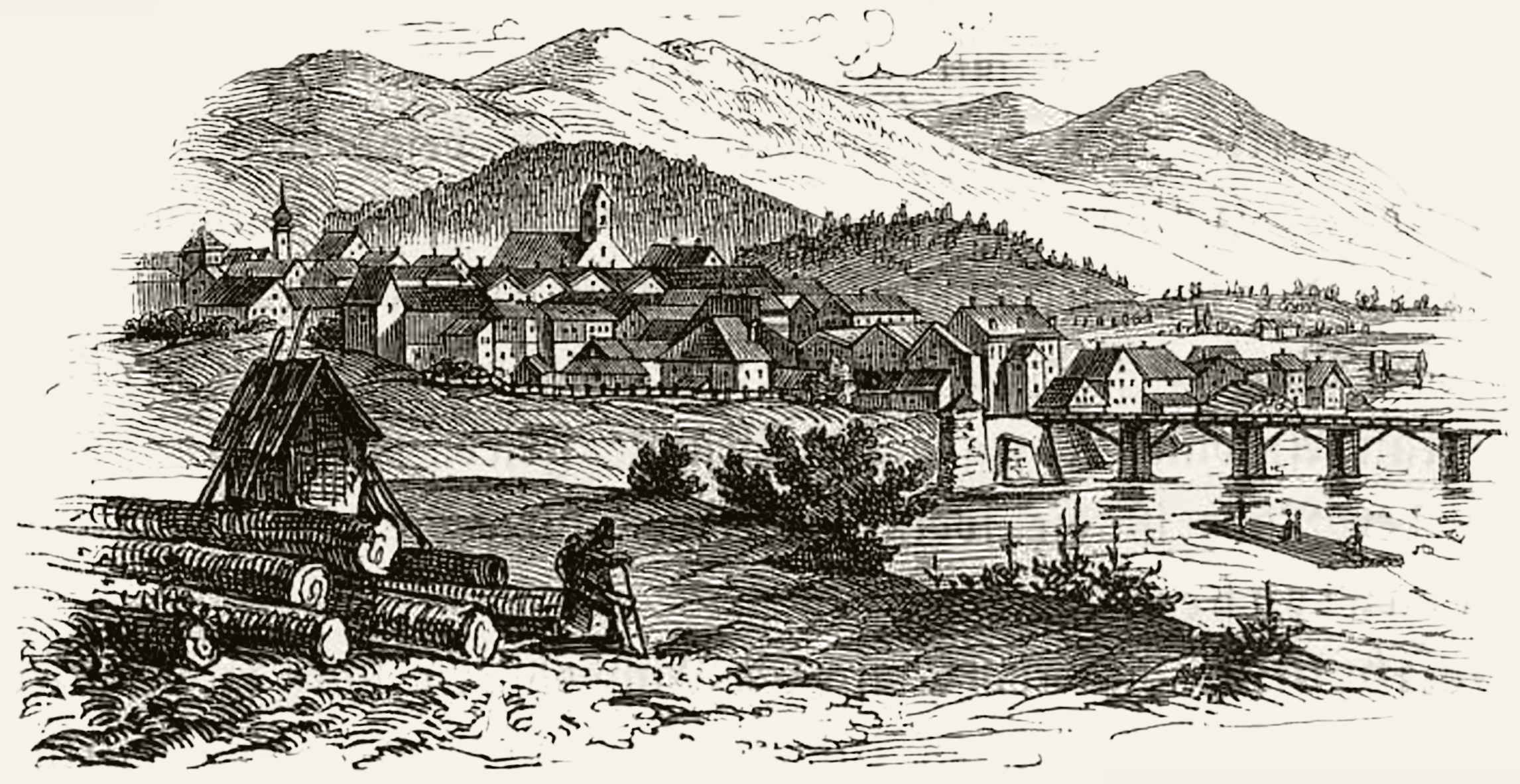 Bad Tölz von Norden mit der hölzernen Isarbücke, 1852/1853.